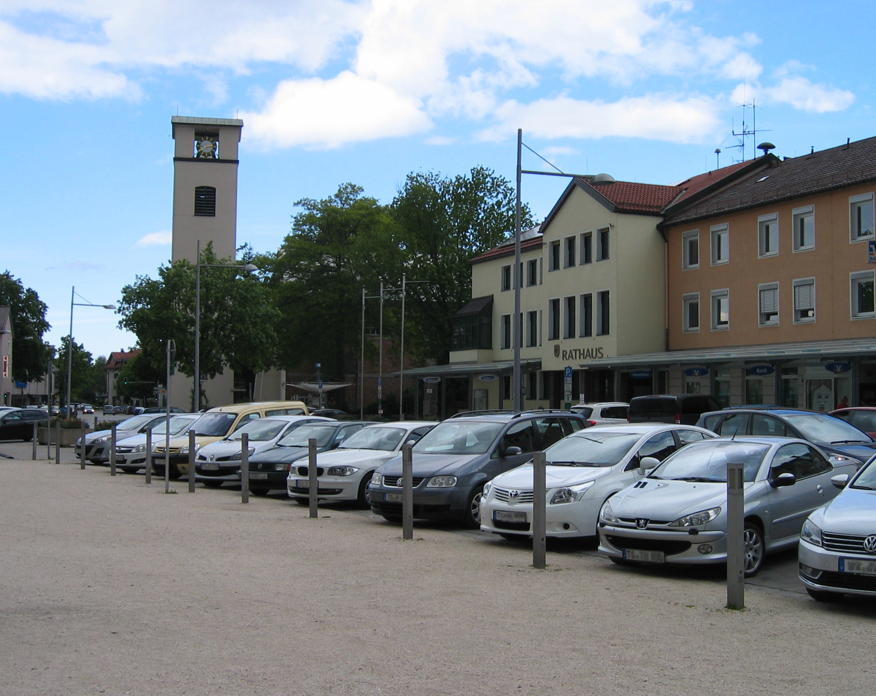 Traunreut Rathausplatz